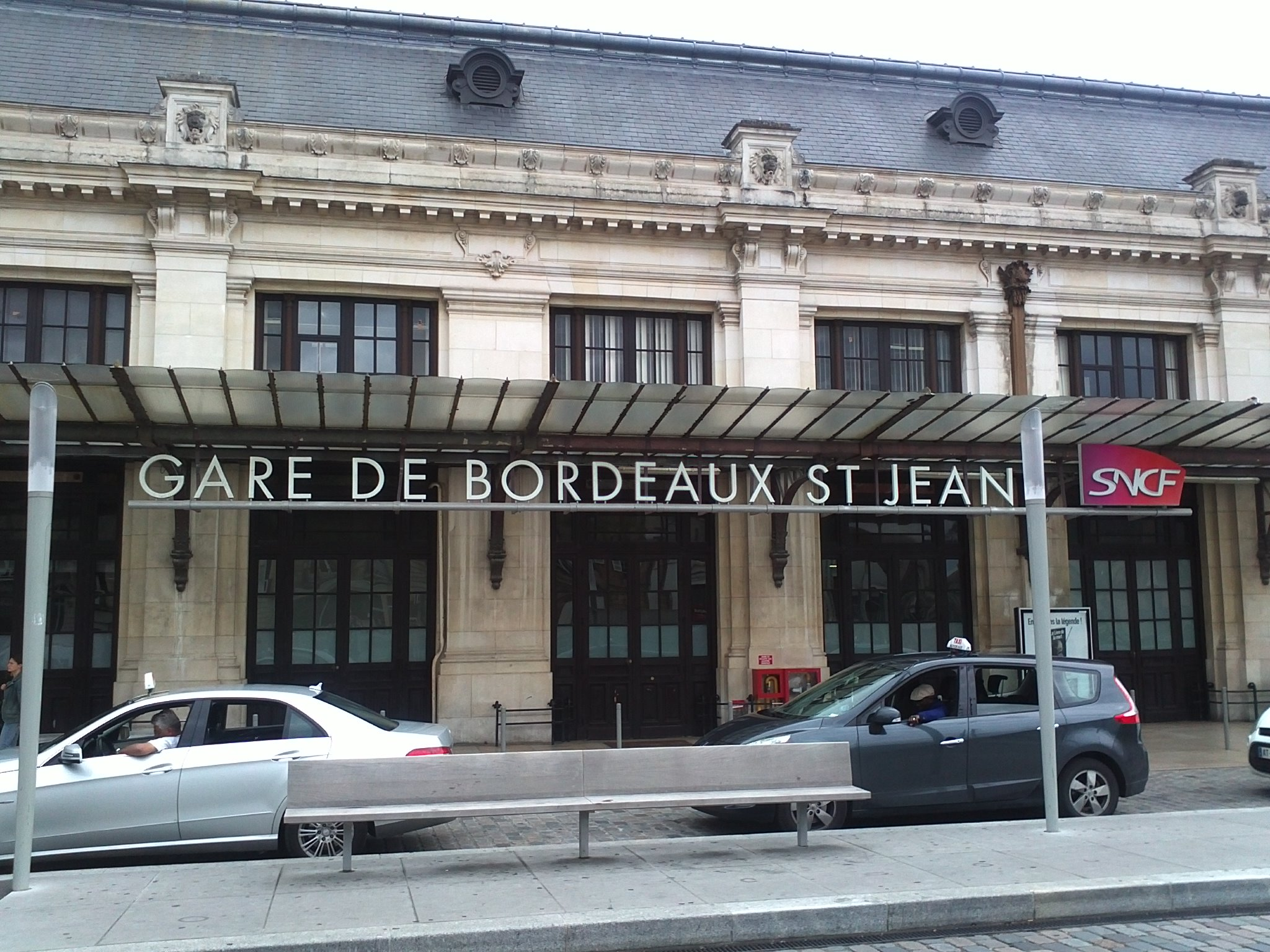 波尔多圣让站（Gare de Bordeaux Saint-Jean）